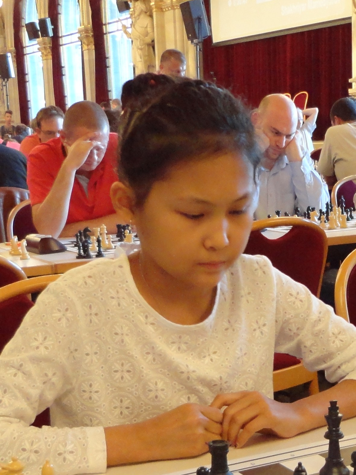 Bibissara Assaubayeva, Vienna Chess Open 2015 in Wien.